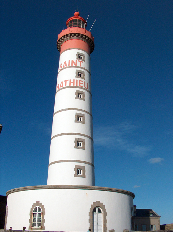 Un tour-tan.